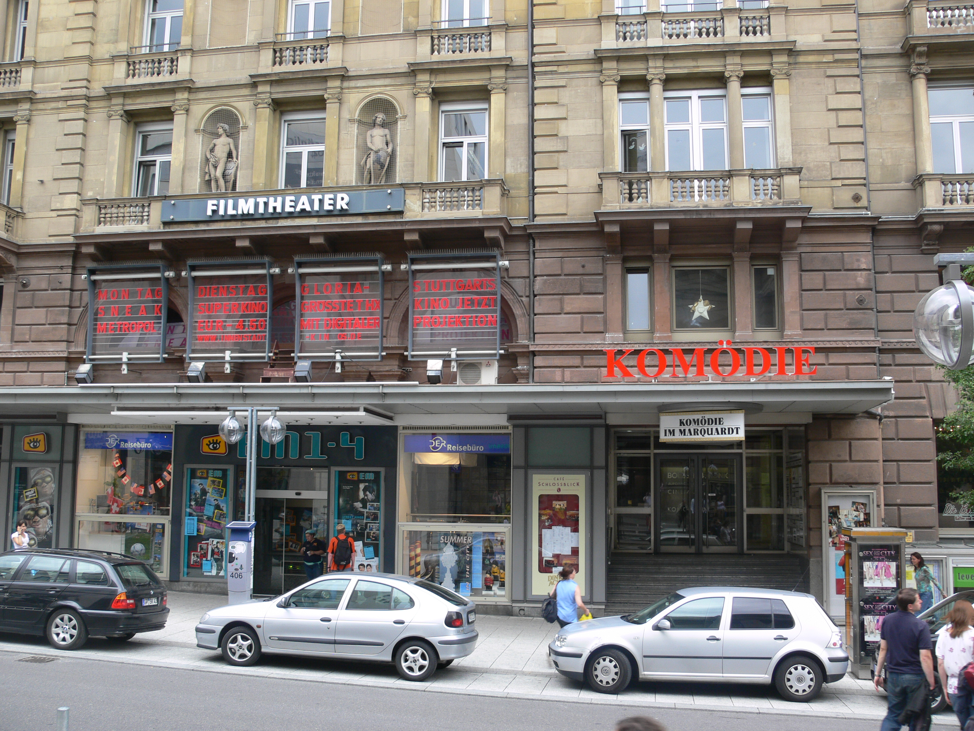 Stuttgart, Bolzstraße, Komödie im Marquardt und EM-Kinos im Marquardt